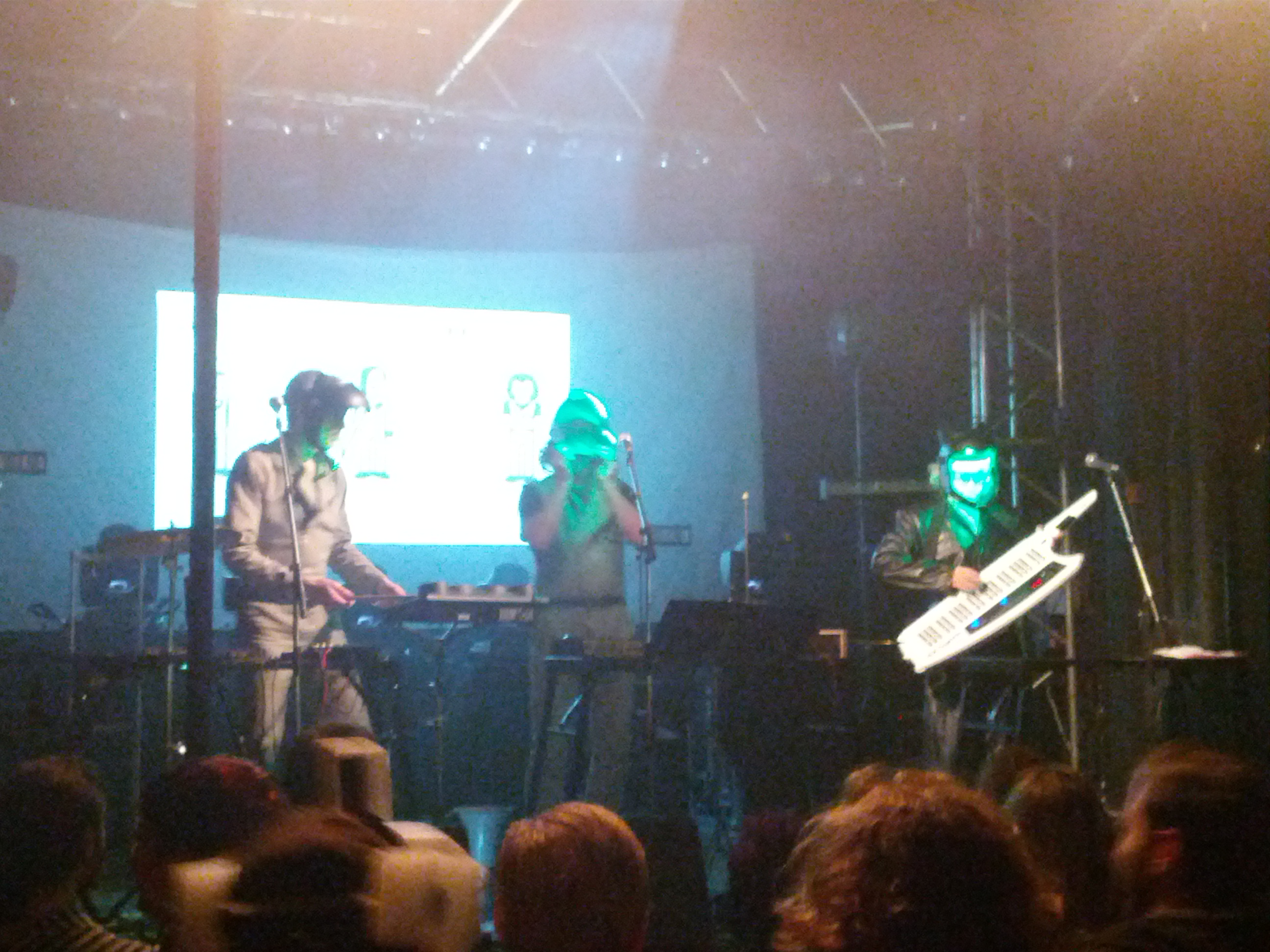 Fraktus spielen im Beatpol in Dresden